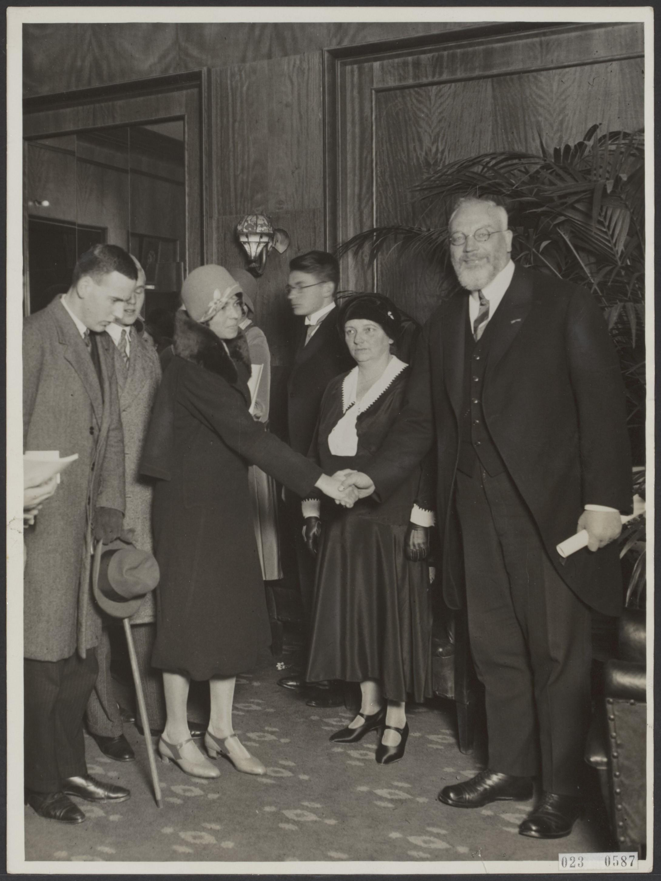 Prof. Casimir, rector van het Nederlands Lyceum, neemt in het City Theater te Den Haag, afscheid van leerlingen en oud leerlingen